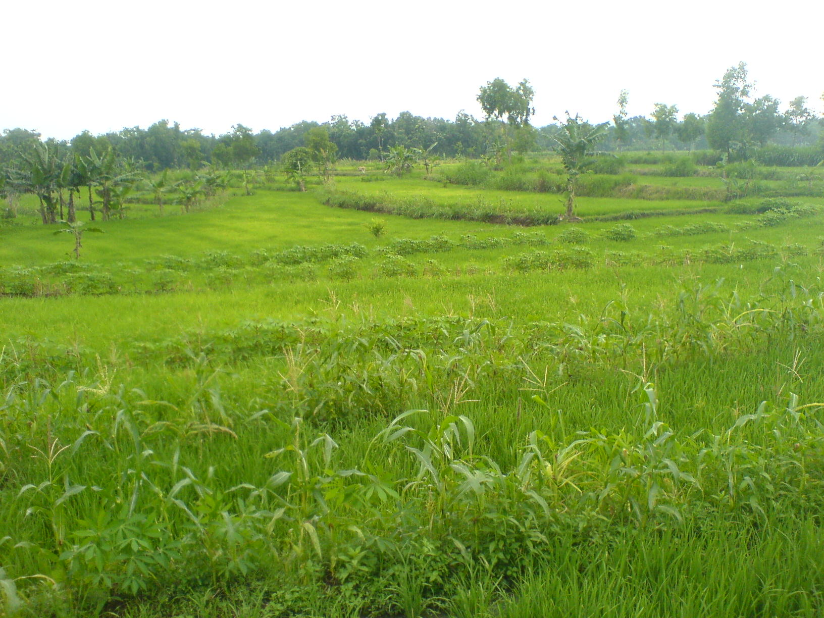 sawah